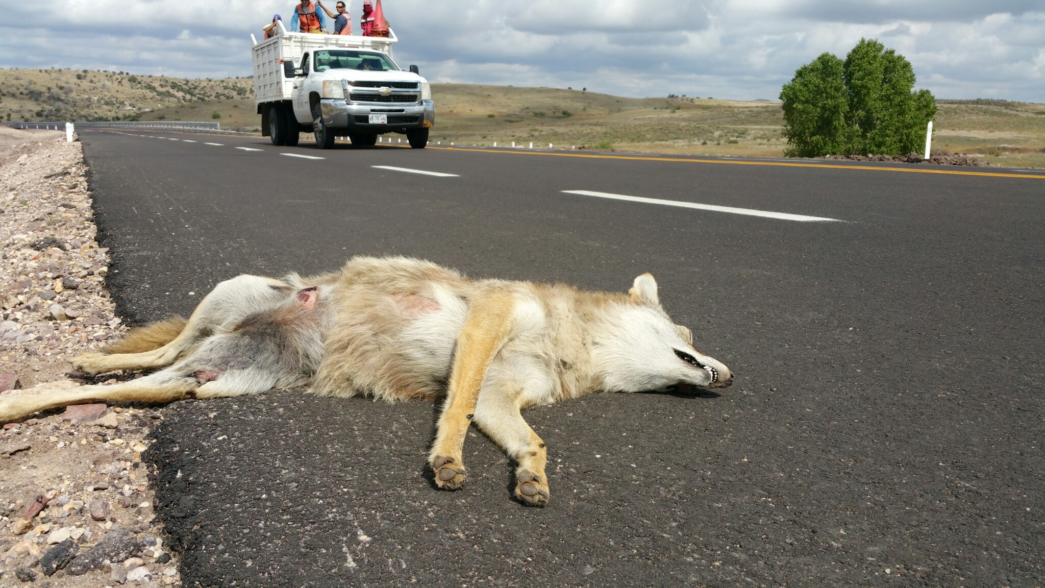 Coyote atropellado en la Carretera Federal 2 en México cerca de Agua Prieta en Sonora.